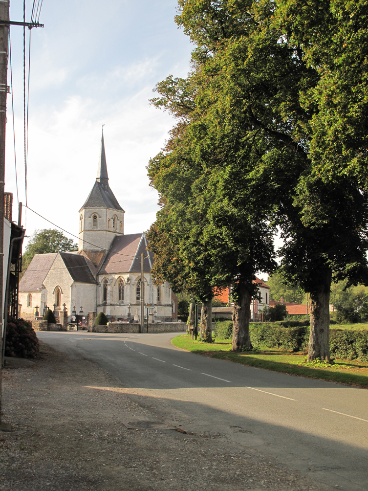 Longvilliers église